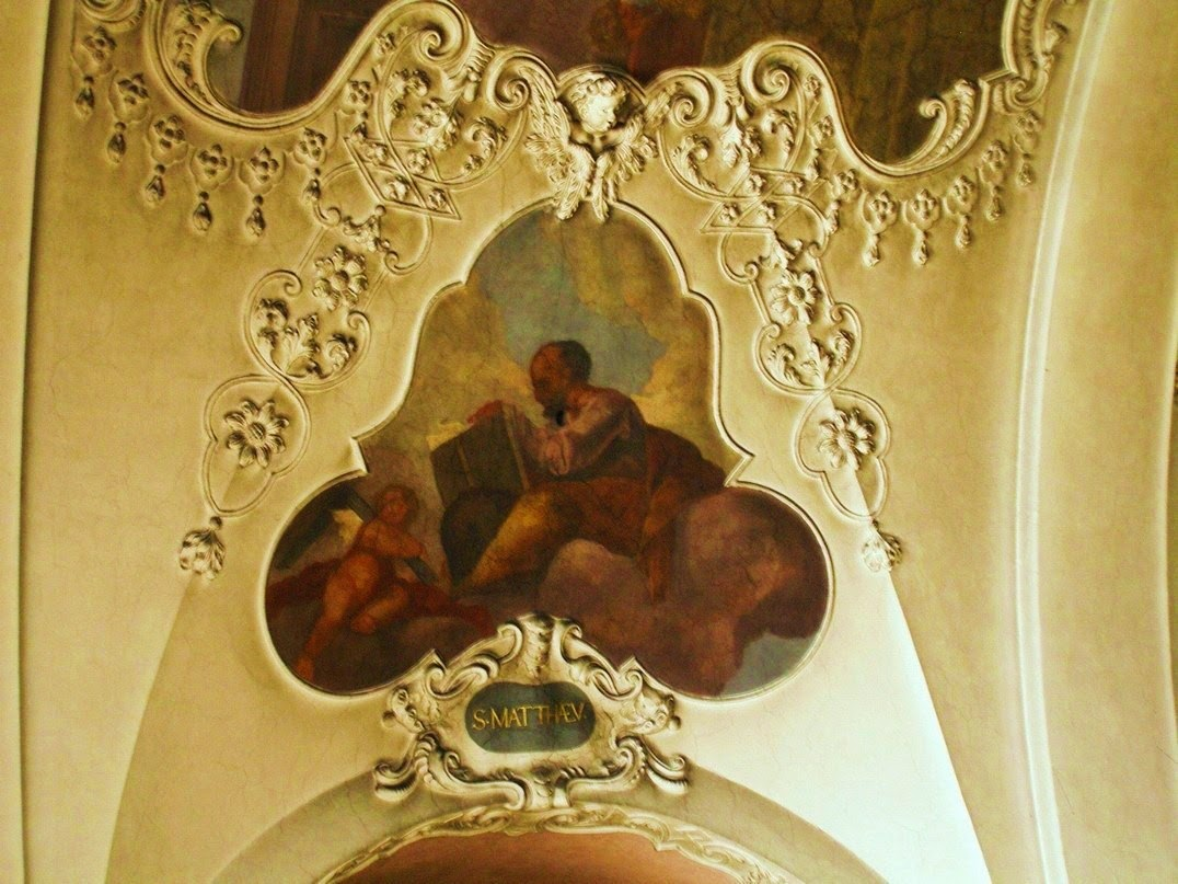 Interiér chrámu sv. Cyrila a Metoděje v Praze